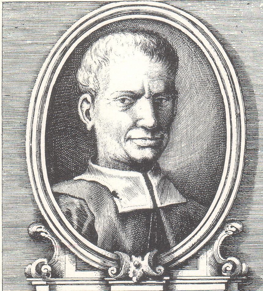 Pandolfo Petrucci (reg.1487-1512), politico estero della Repubblica di Siena, a un incisione